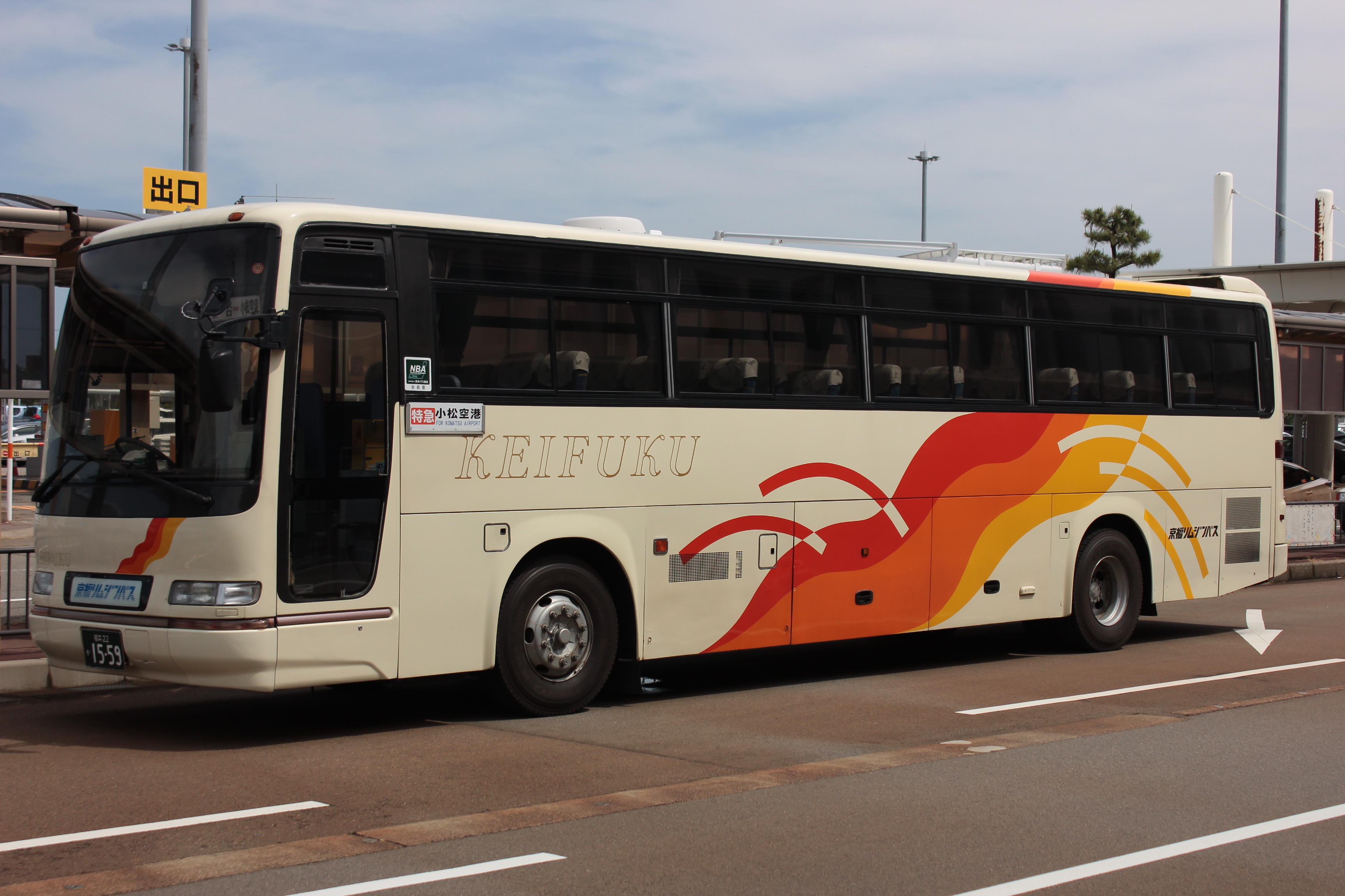 京福リムジンバスが運行する小松空港連絡バス（日野・セレガ、KC-RU3FSCB）。 Canon EOS Kiss X5